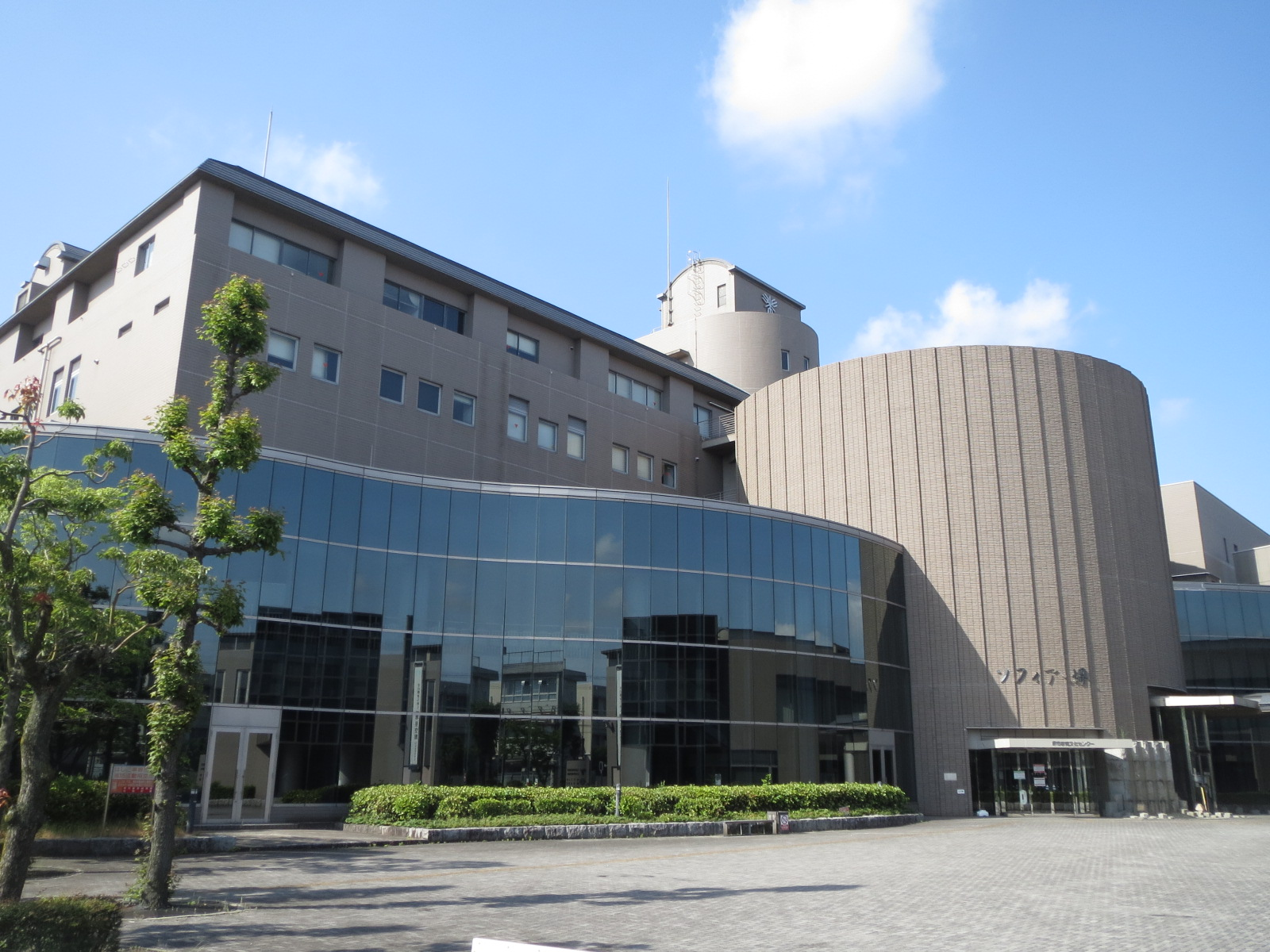 プラネタリウムを備える会館 Canon IXY 3